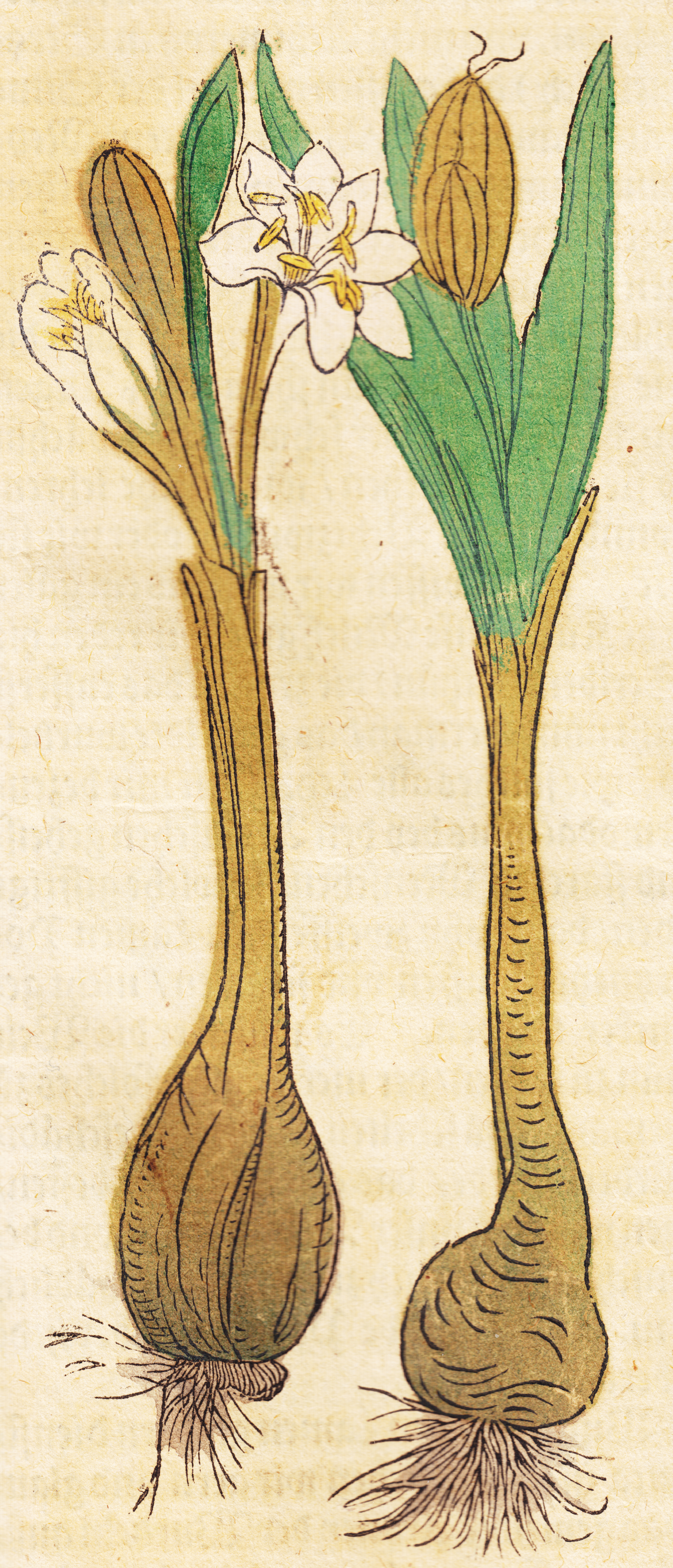 Wysen Zeitlosen (Colchicum autumnale)